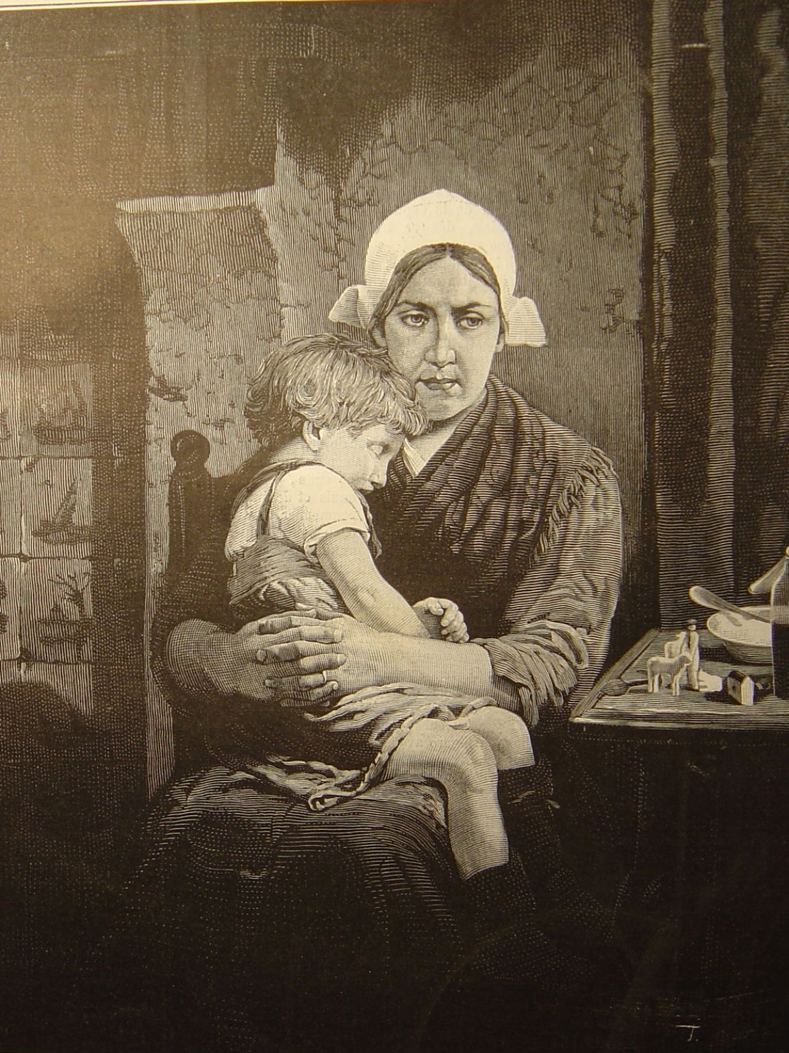 Dans cette scène d'un naturel si parfait on reconnaît la touche fine du pinceau.Les scènes de la vie de famille nous procurent toujours quelque émotions née à la fois de notre nature et de nos souvenirs Nous voici transportés dans une modeste chambre d'ouvriers. Une femme tient sur ses genoux son enfant malade, sur la table une bouteille de médecine , quelques jouets mais le pauvre petit n'a nulle envie de jouer et s'assoupit pendant que sa mère reste triste et soucieuse